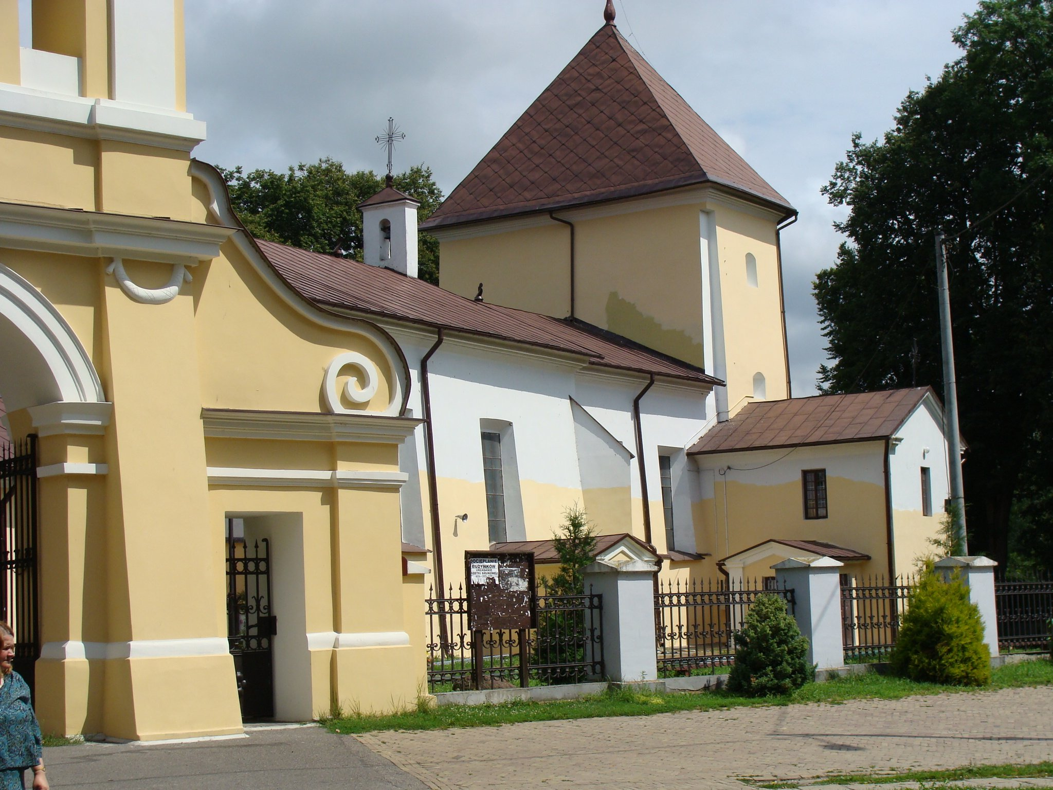 Kościół parafialny p.w. św. Zofii w Tarnogórze (zabytek nr rejestr. A/95 z 29.11.1966)